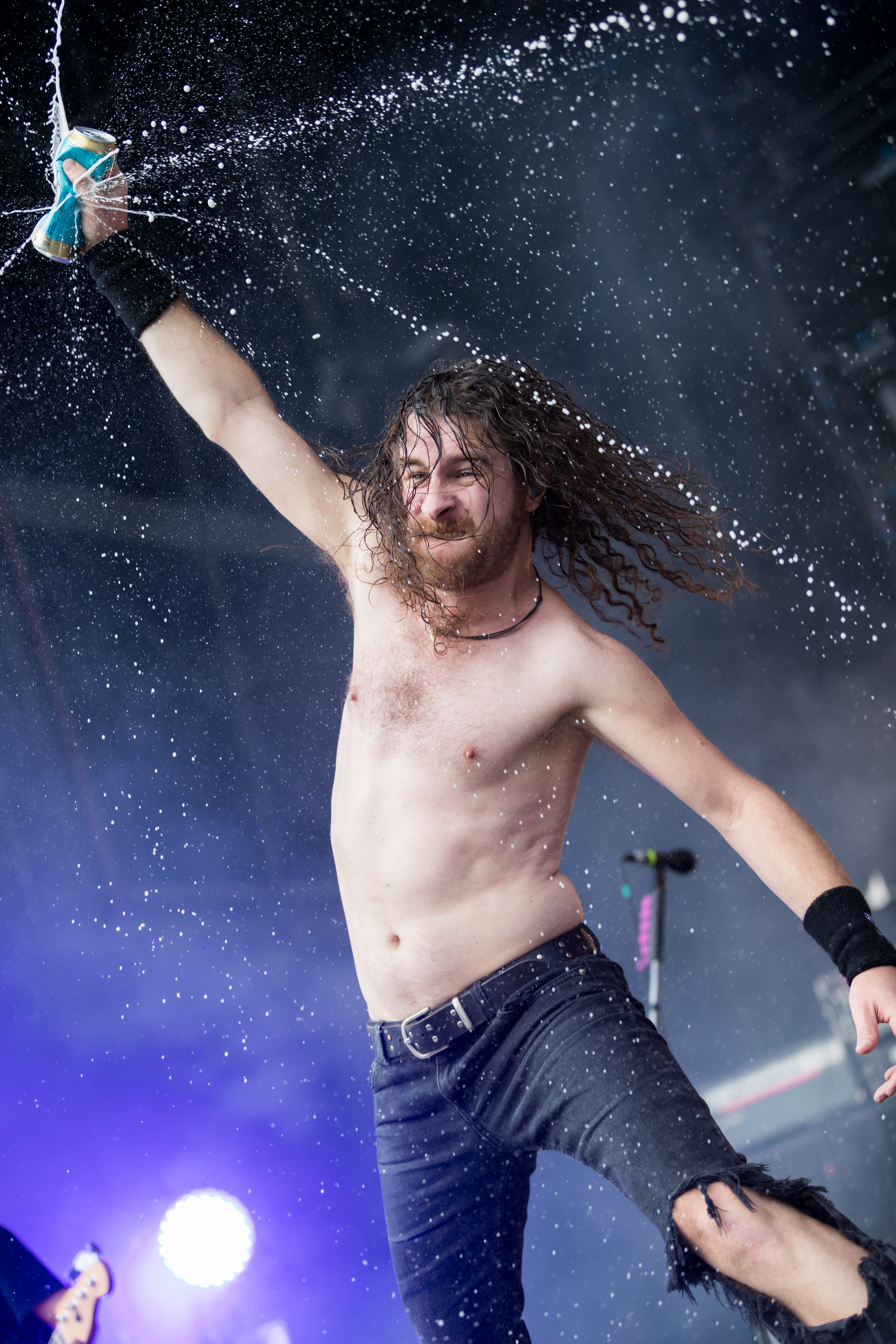 Airbourne during Rock am Ring at Nürburgring, Nürburg, Rheinland Pfalz, Germany on 2017-06-04, Photo: Sven Mandel